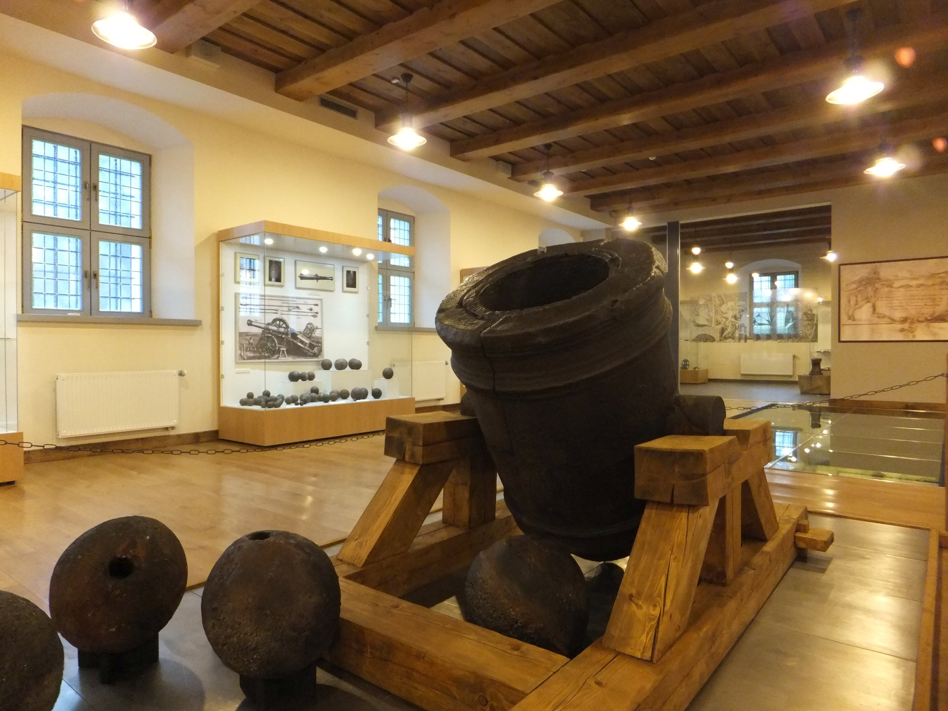 Mortyra